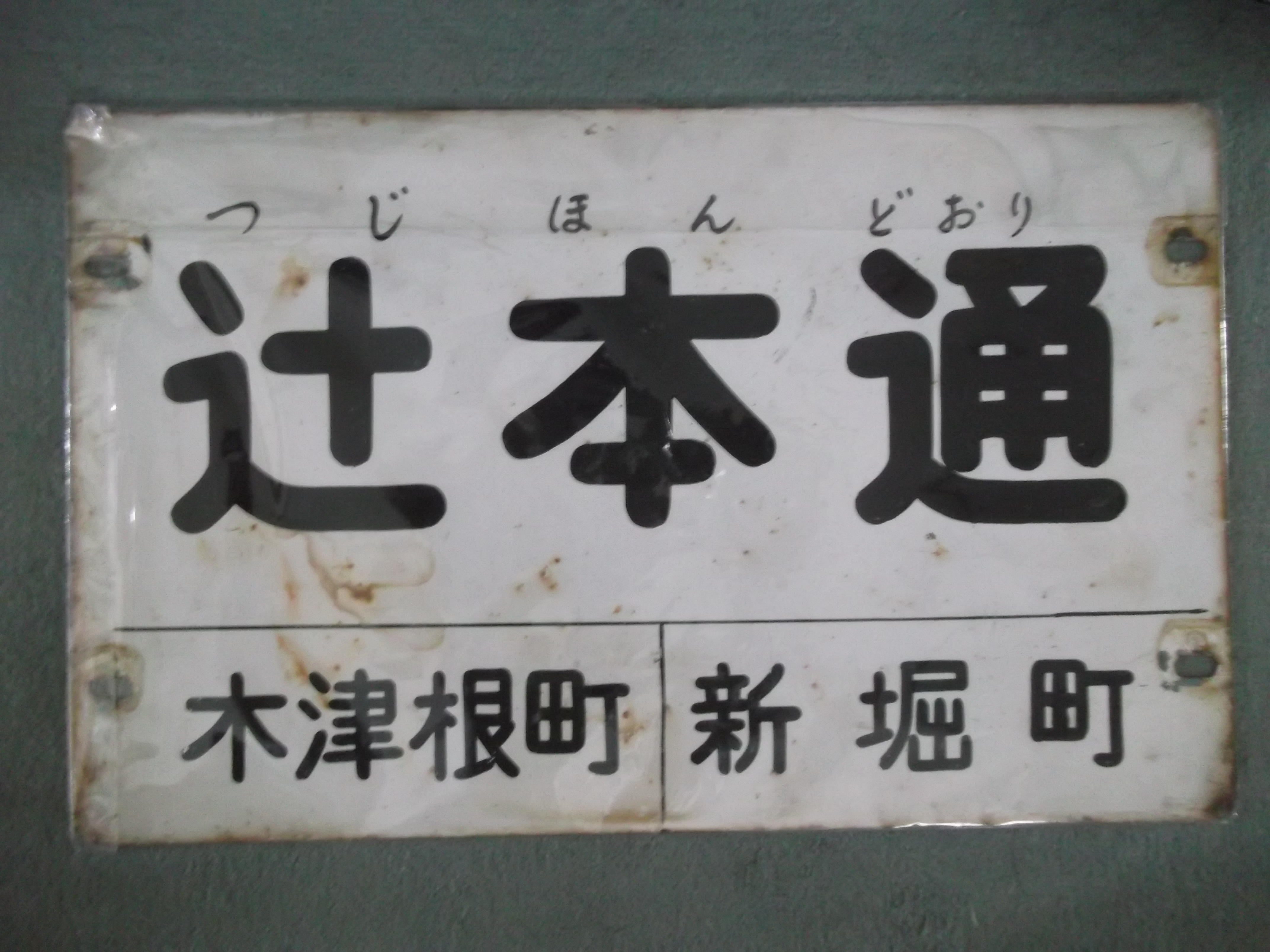 名古屋市交通局「辻本通」バス停留所の名称を示す看板。隣接停留所名から、「防衛道路」（愛知県道102号名古屋犬山線）を通っていた路線のものとみられる（隣接停留所はどちらも系統・停留所としても現存しない）。この看板が使用されていた詳細な時期は不明だが、この系統は昭和40年ごろには存在していたようである（『如意 二十五年のあゆみ』名古屋交通労働組合如意自動車支部、1990年所収の路線図による）。交通局から払い下げ後、どのような経緯を経たのか不明だが、鉄道部品等販売店にて購入。（撮影者蔵）